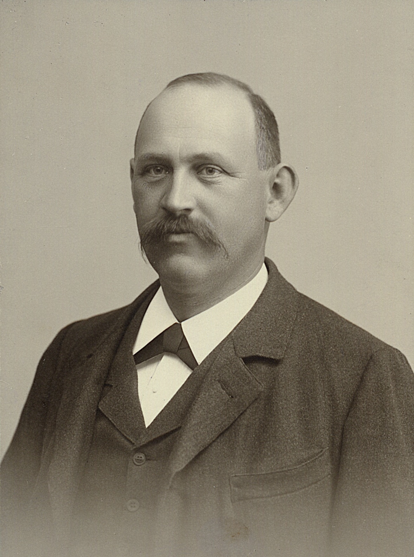 Handschriftlich signiert